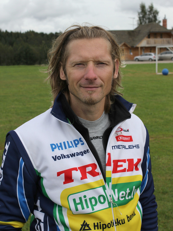 Jēkabs Nākums. Fotogrāfs: Aigars Mahinovs. Uzņemts speciāli Vikipēdijai.